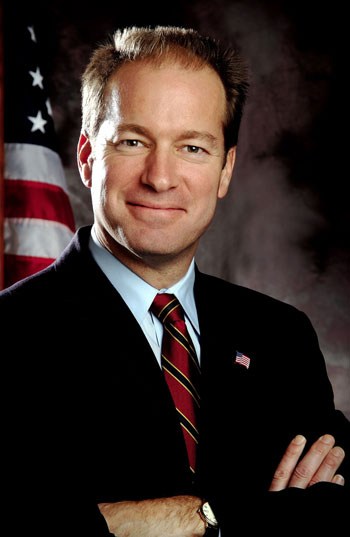 Peter Roskam, U.S. Congressman.